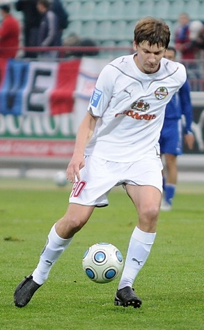 Андрей Николаевич Воронков — белорусский футболист.